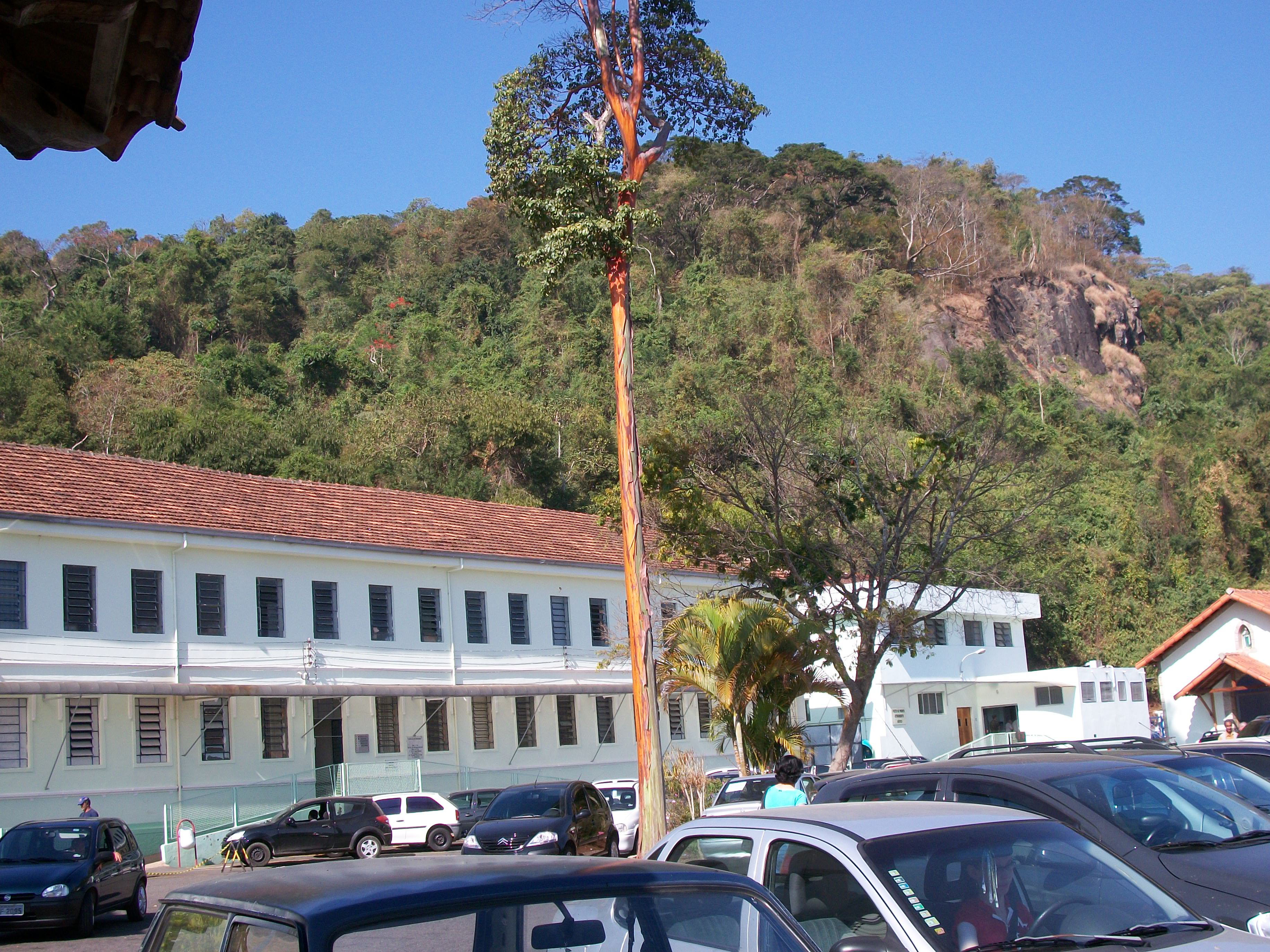 Vista parcial do primeiro pátio do HGeJF em Juiz de Fora.